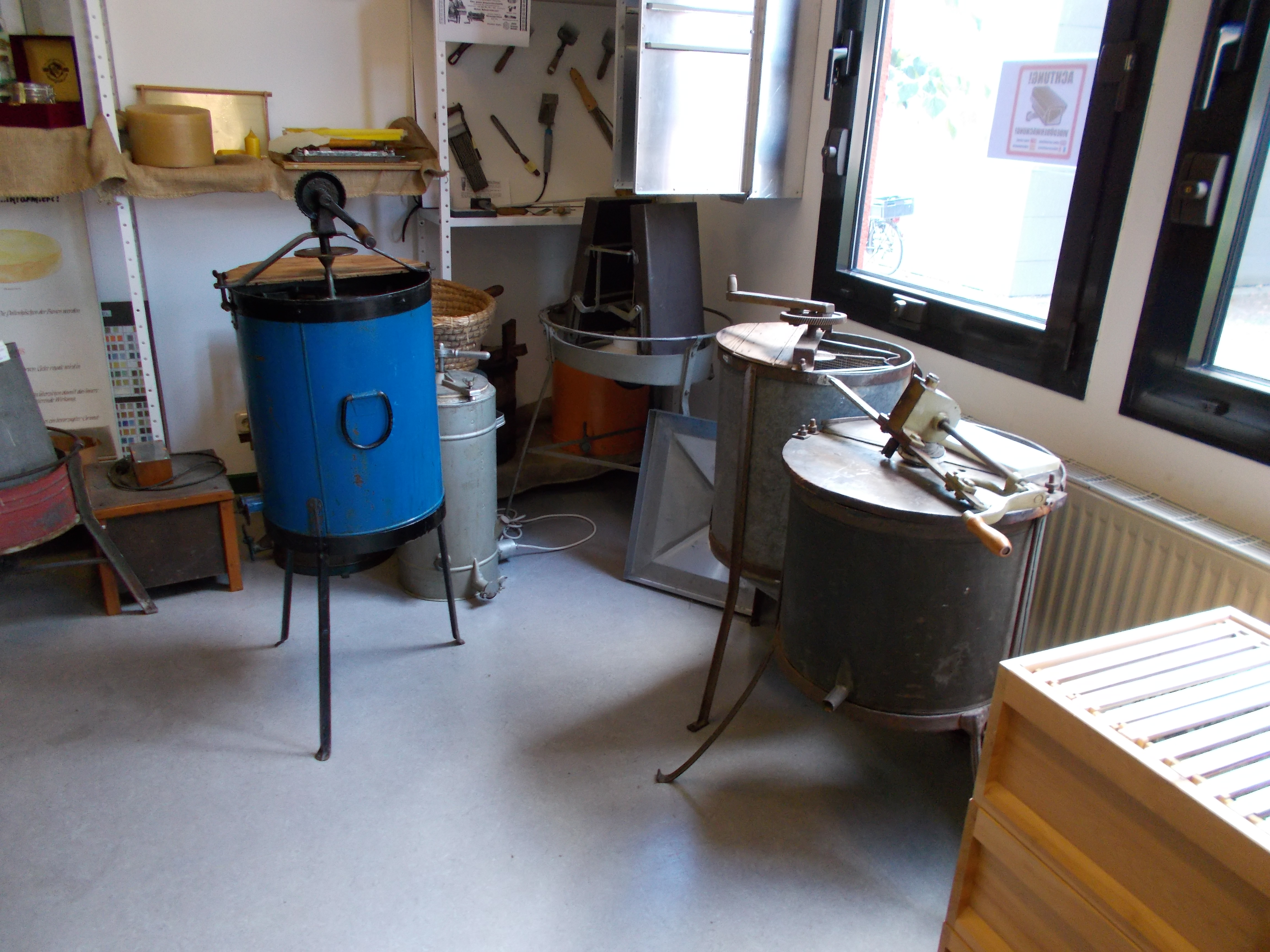 Das Bienenmuseum in Duisburg Rummeln-Kaldenhausen ist ein kleines Imkereimuseum des Kreisimkerverband Duisburg e. V. - Honigschleudern, Bienenkasten, Werkzeuge des Imkers.